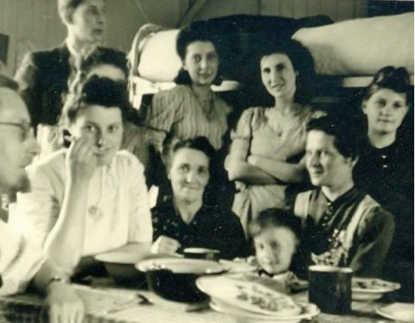 Familles mosellanes internées au camp spécial de Striegau par les nazis pour les " rééduquer ". Famille considérées comme opposant du fait de leur francophilie du refus pour certains membres d'intégrer l'armée allemande.